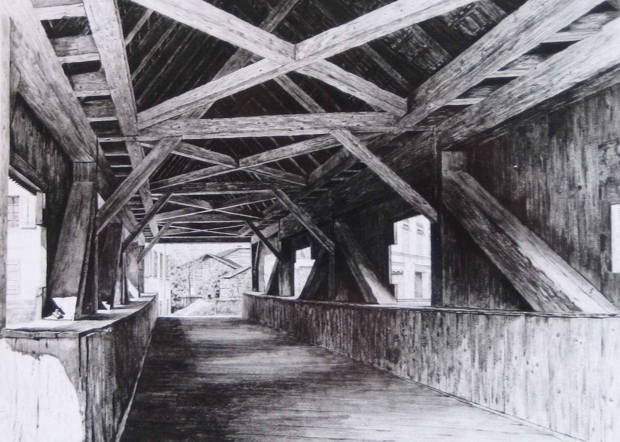 Gedecktes Brüggli innen, lavierte Federzeichnung von Saugy